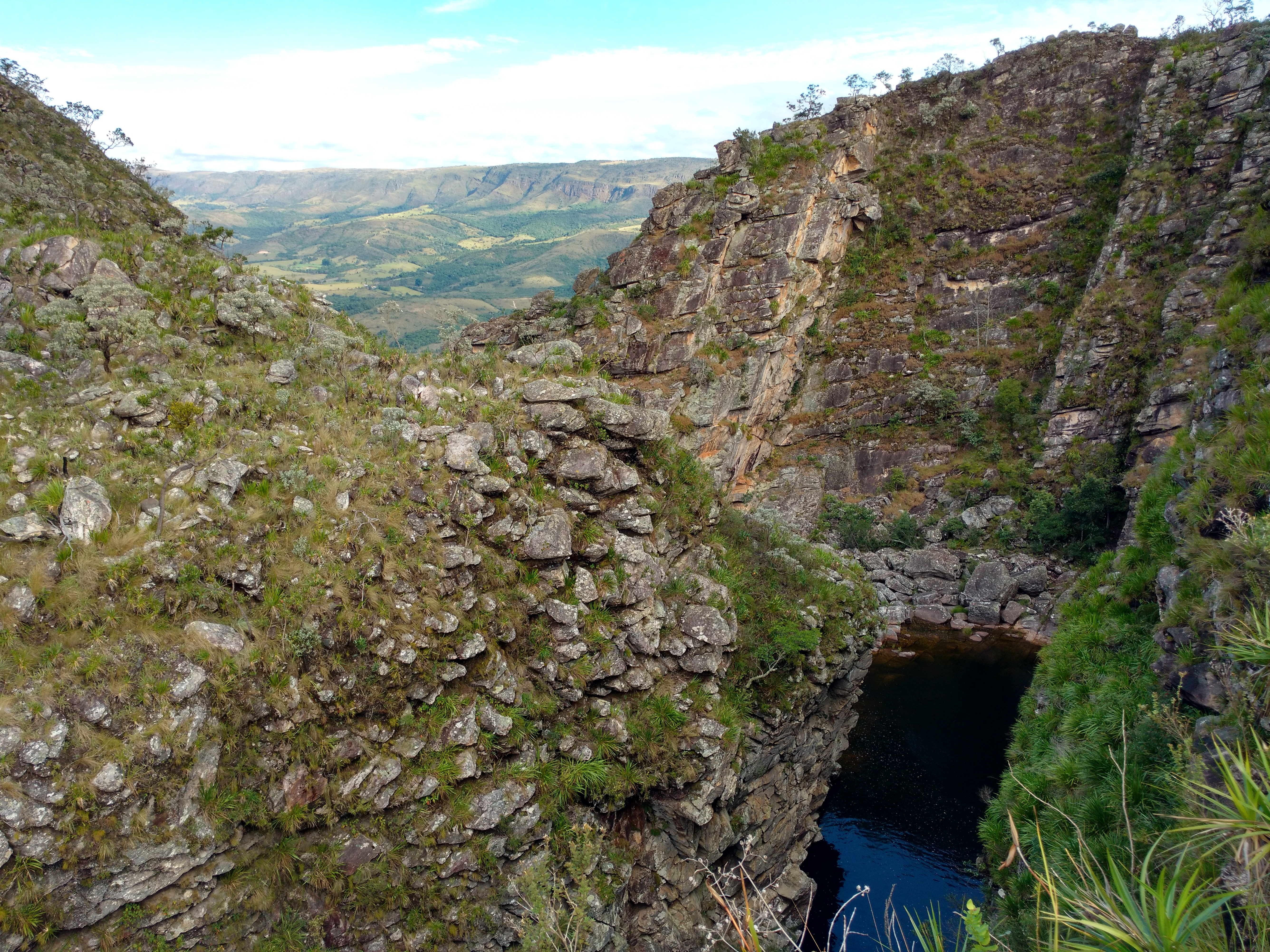 Após percorrer mais de 30km do Parque Nacional da Canastra, encontramos o rio que dá inicio a Cachoeira Casca D'anta e este lindo Canion antes de sua queda de mais de 180m